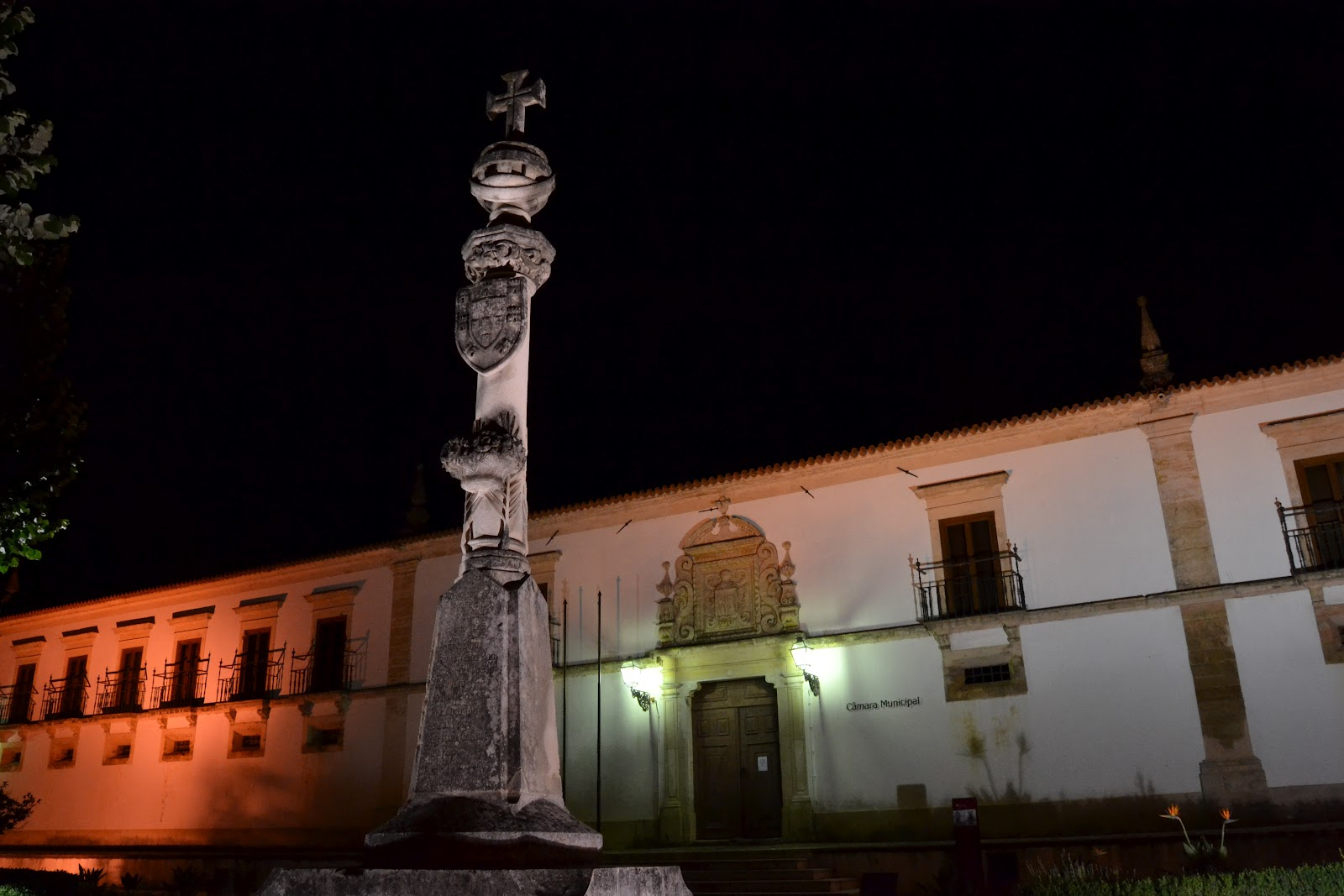 Vista noturna da Câmara Municipal de Condeixa, com o Monumento aos Mortos da I Guerra Mundial em primeiro plano.